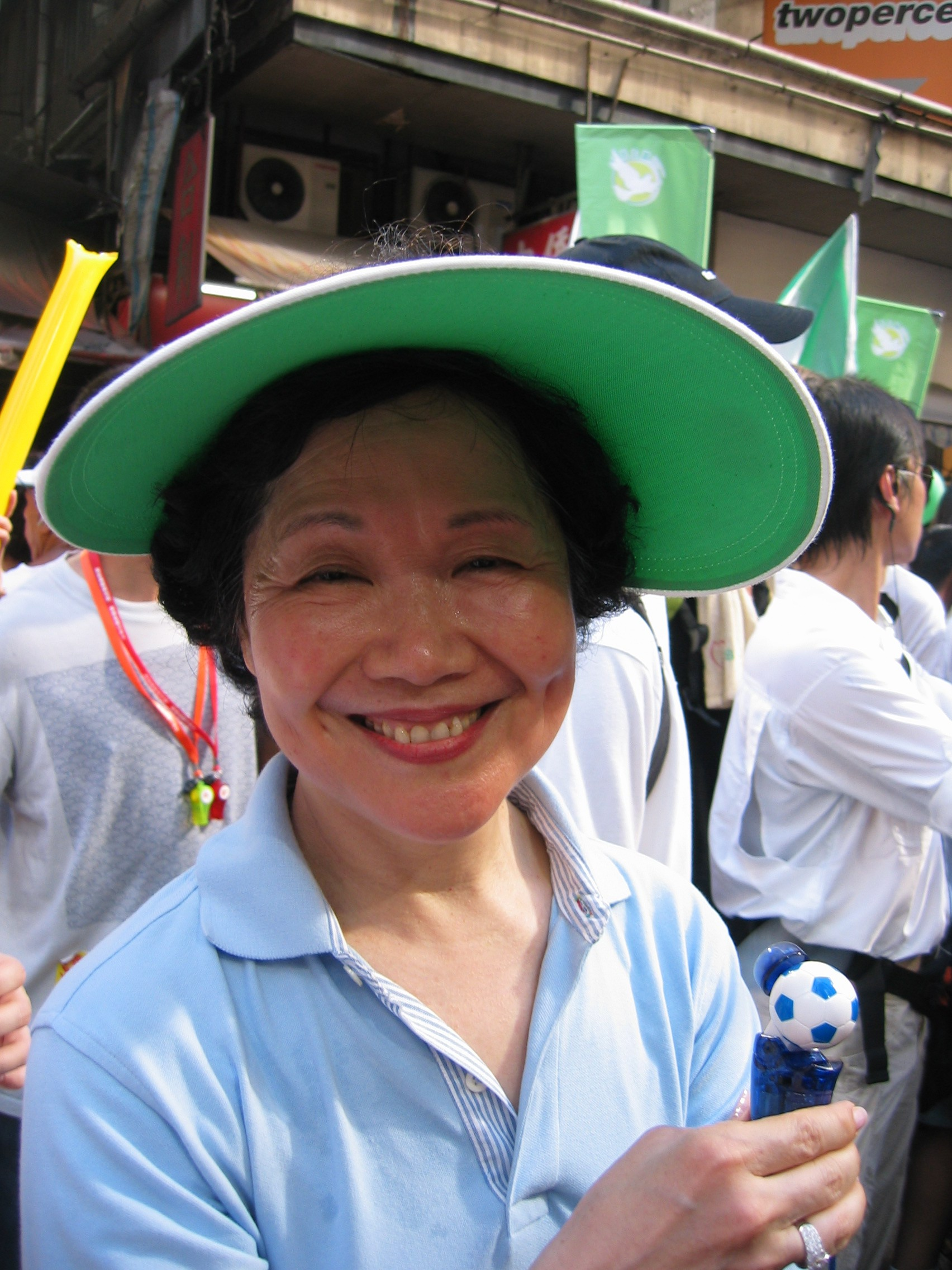 中文（香港）: 陳方安生參加2006年七一大遊行。